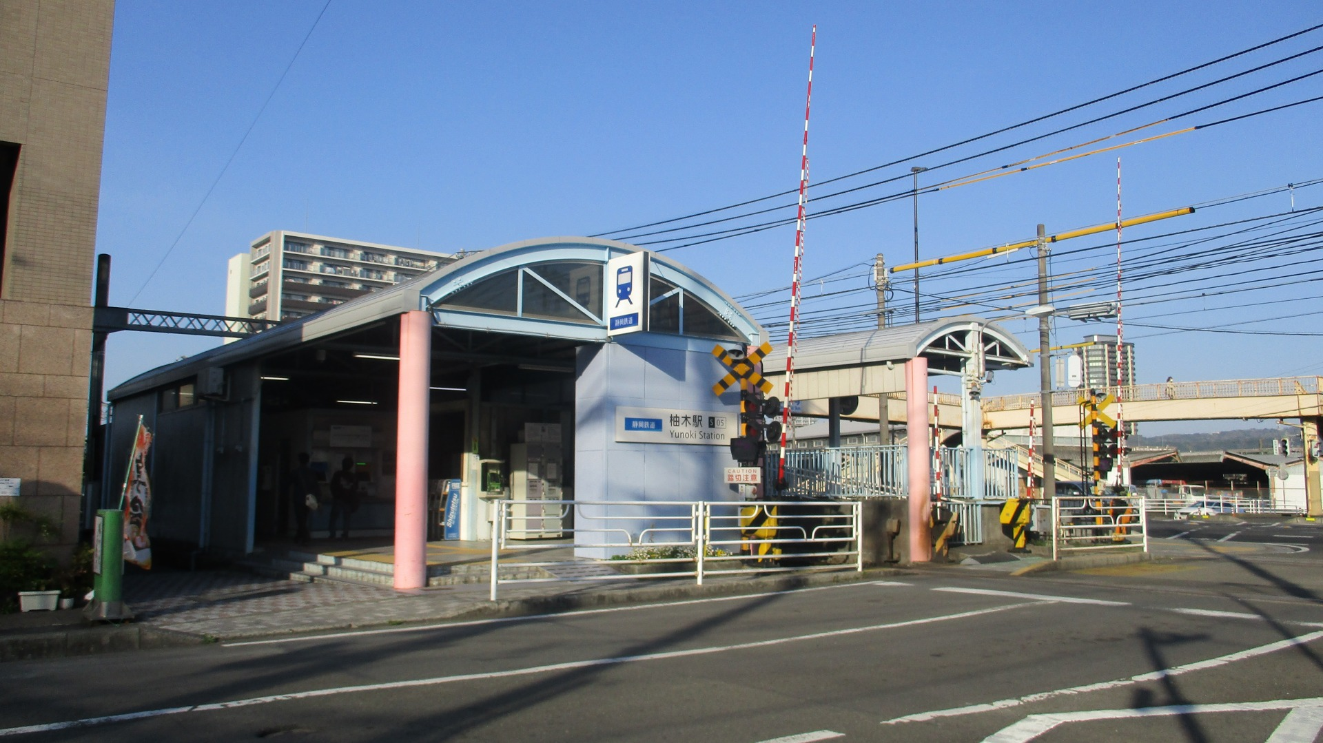 差し替え用画像です